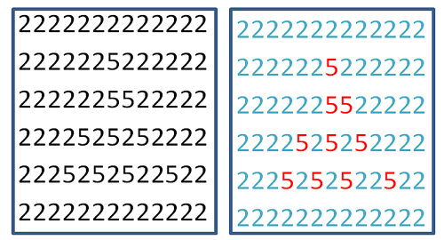 Tarea de Stroop, los sinestésicos perciben la imagen de la izquierda asociada a diferentes colores , como se muestra en la derecha .